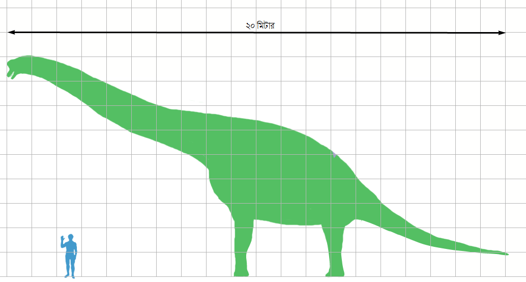 সরোপড ডাইনোসর জিরাফাটাইটানের সাথে একজন মানুষের গড় আয়তনের তুলনামূলক চিত্র।